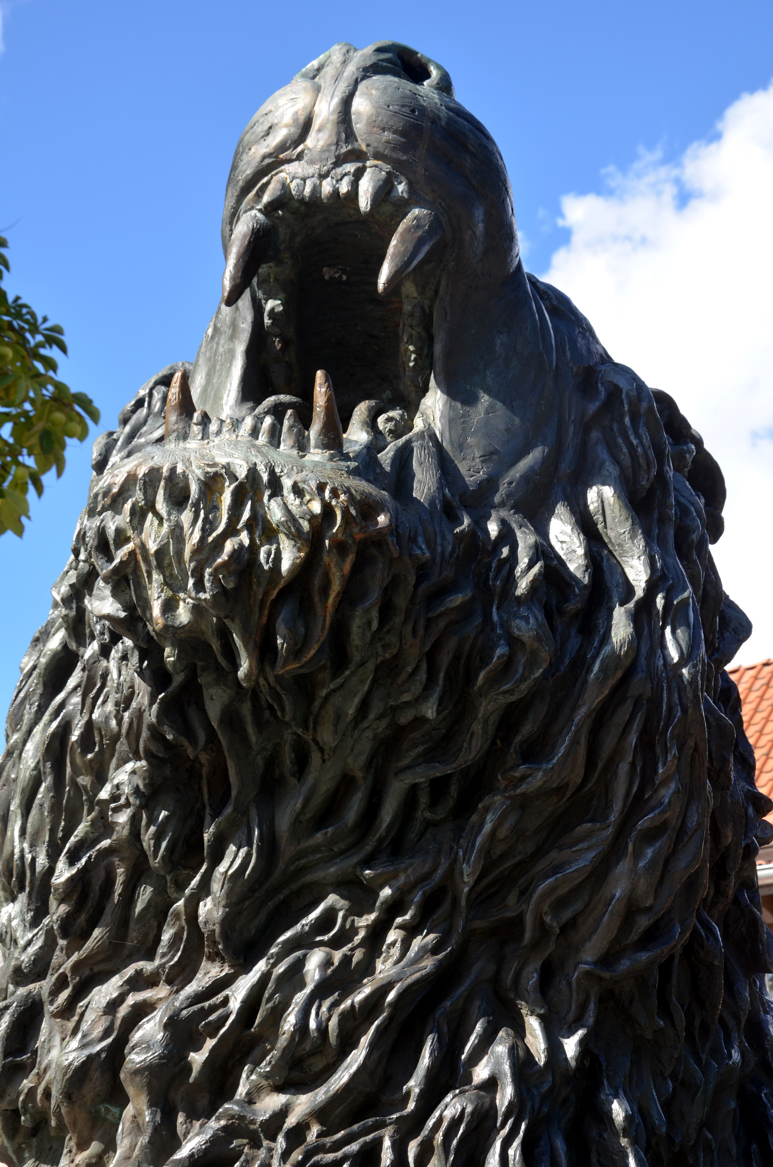 Anlässlich einer Führung durch Schloss Landestrost für dem Freundeskreis Hannover und einem Besuch der Sektkellerei Duprès enstand im Vorfeld durch ehrenamtliche MItarbeiter vom Wikipedia-Büro Hannover diese Detail-Aufnahme vom Löwen zwischen Brücken in Neustadt am Rübenberge ...